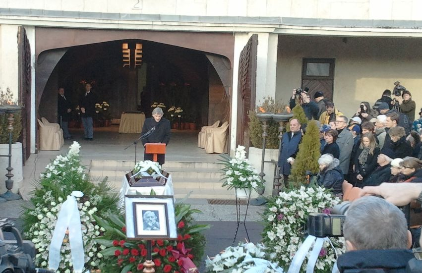 Garas Dezső búcsúztatása. Farkasréti temető.